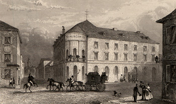 Gebäude der Museumsgesellschaft Karlsruhe, Nordostecke Lange Straße/Ritterstraße. Architekt: Friedrich Weinbrenner.